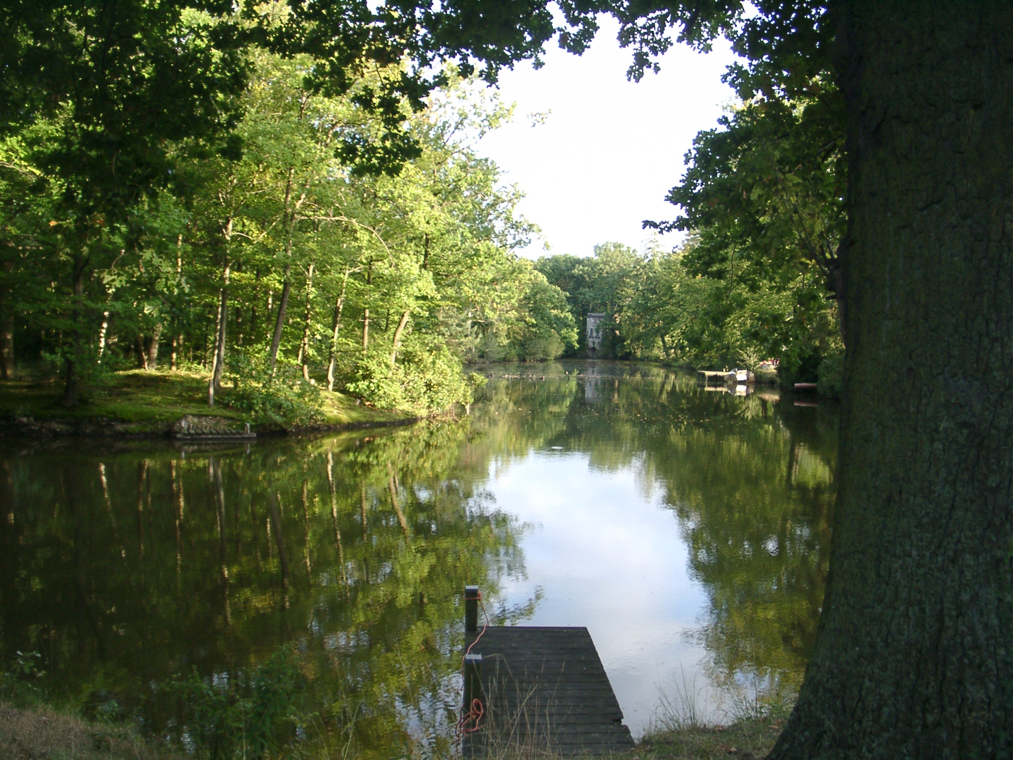 Schillingspark